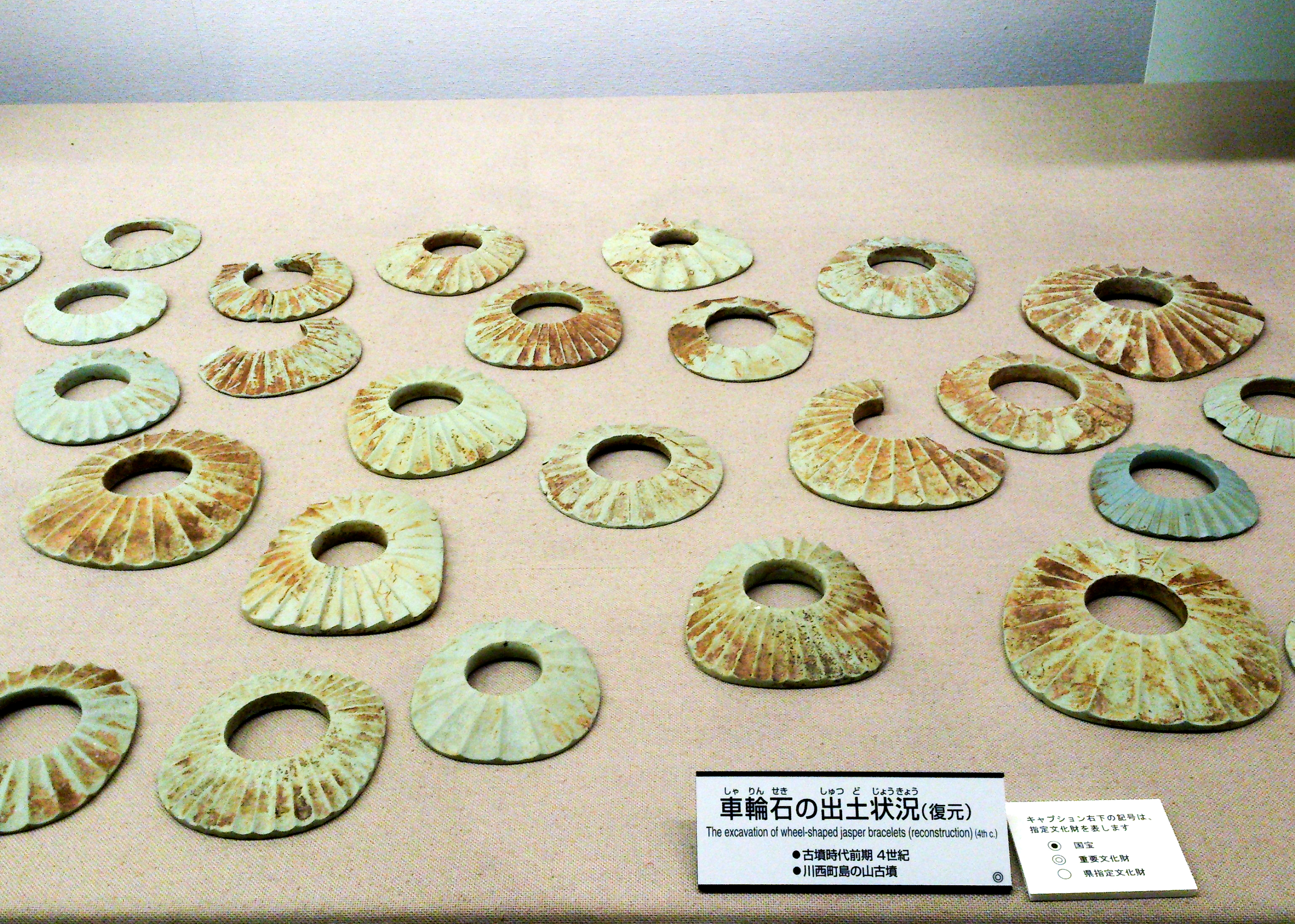 島の山古墳出土車輪石（橿原考古学研究所附属博物館）